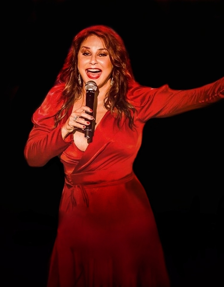 Fafá durante show em 2014